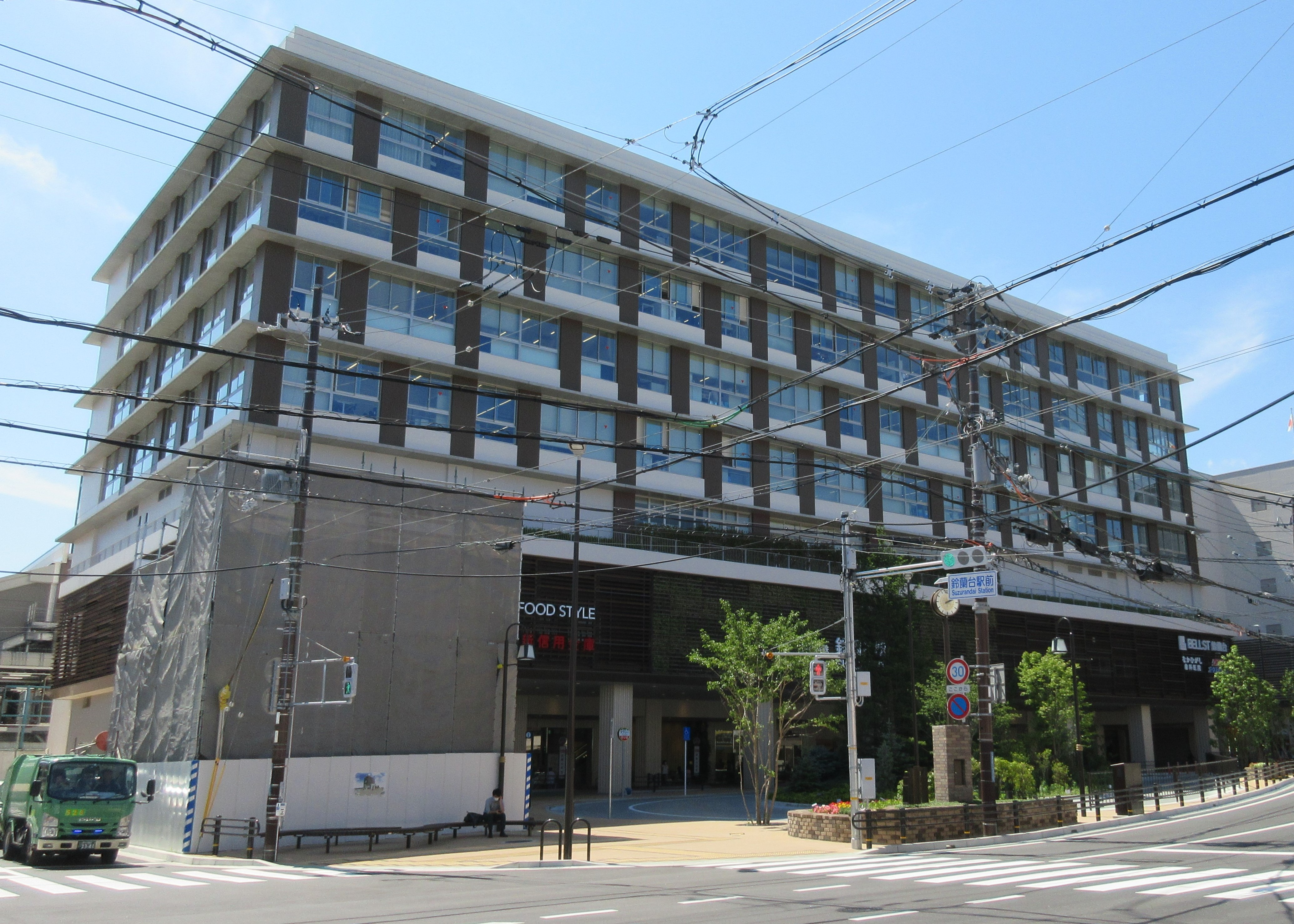 ベルスト鈴蘭台